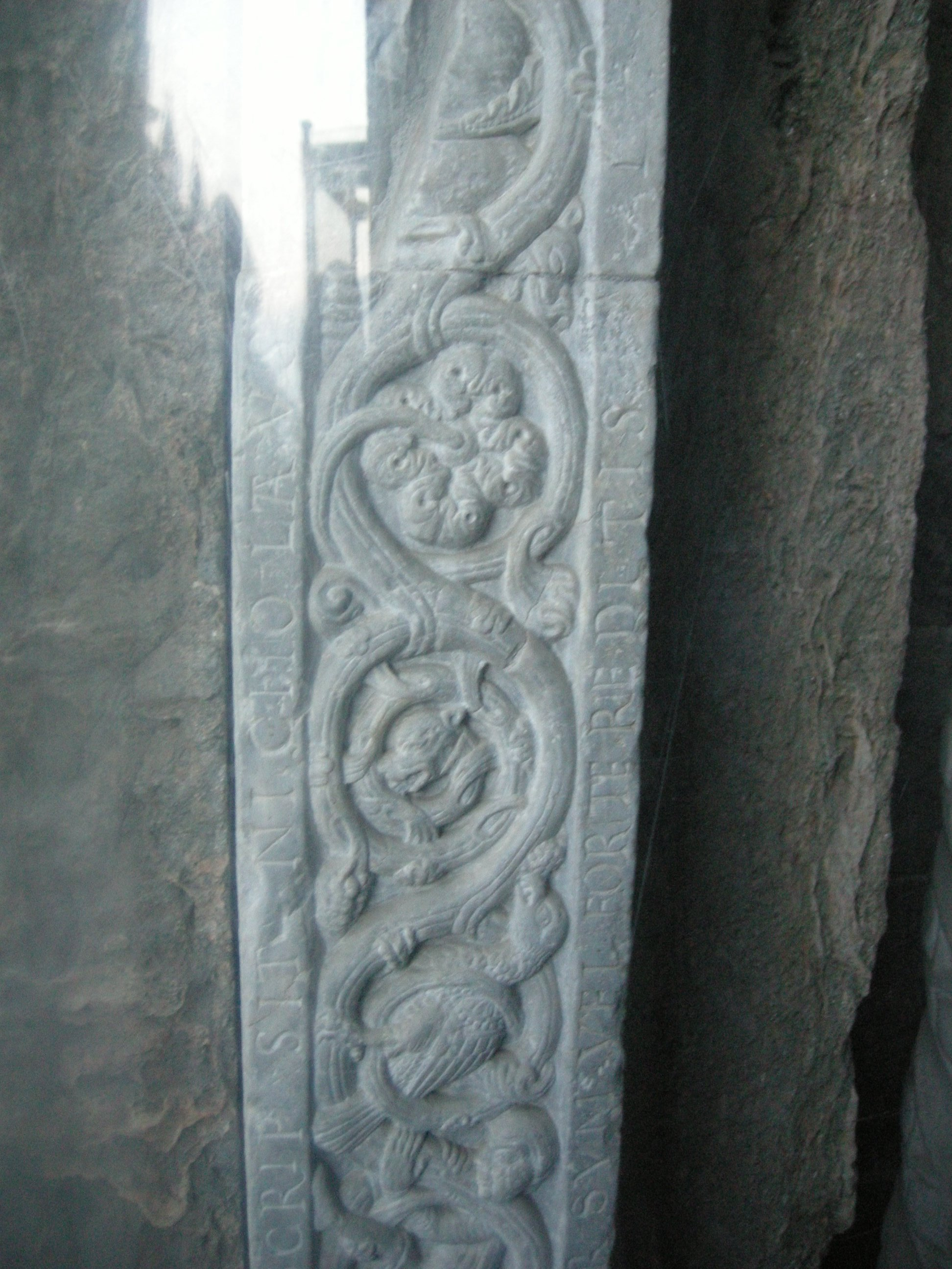 Porta dello zodiaco 22 fima nicholaus